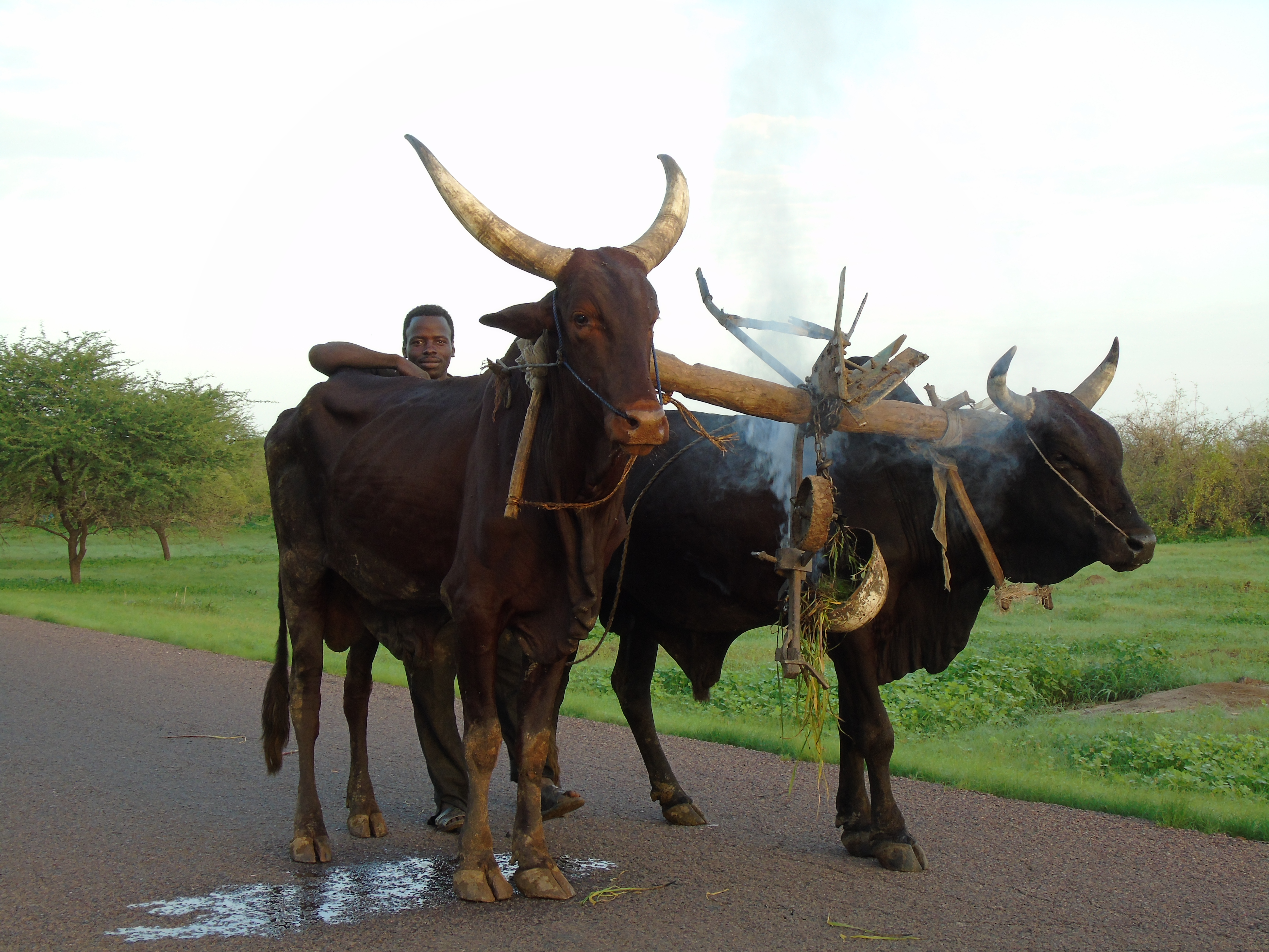 Le pâturage des bovins pendant la saison pluvieuse à Dandi, un village situé non loin de N'djamena (Tchad). Les bêtes sont protégés contre les moustiques grâce à des fumés